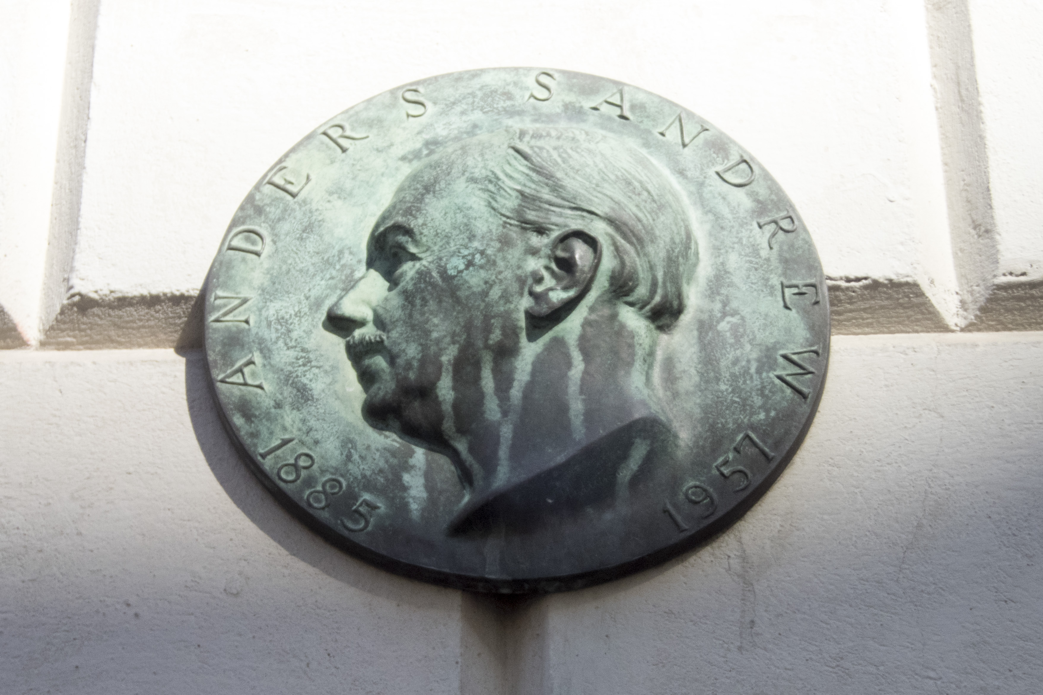 Relief av Anders Sandrew (1885-1857) på Kommendörsgatan 37. Grundare av Sandrewkoncernen. Här startade han som 16-åring speceributik och bodde i fastigheten 1901-1937.